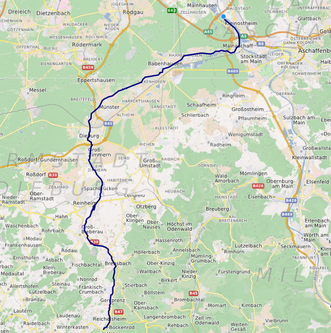 carte réalisée sur umap This map may be incomplete, and may contain errors. Don't rely solely on it for navigation.